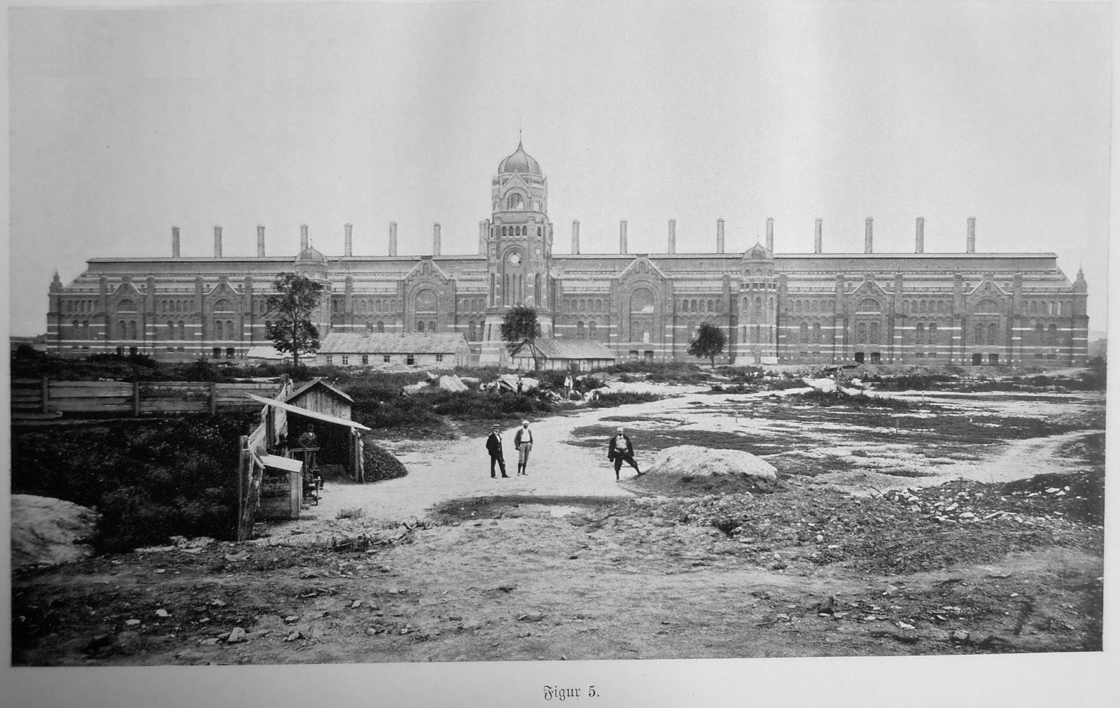 Gasometer Simmering: Figur 5. Ofenhaus